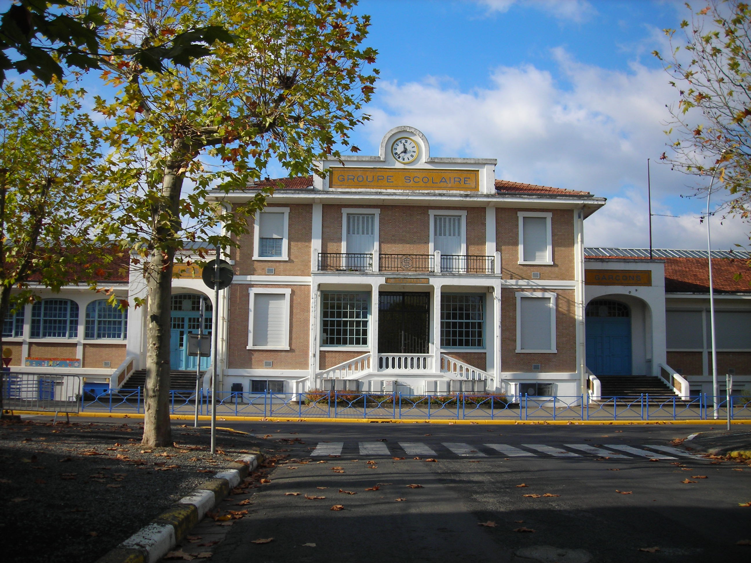 Le groupe scolaire de Saint-Benoît-de-Carmaux, conçu en 1930 par l'ingénieur Charles Peres.